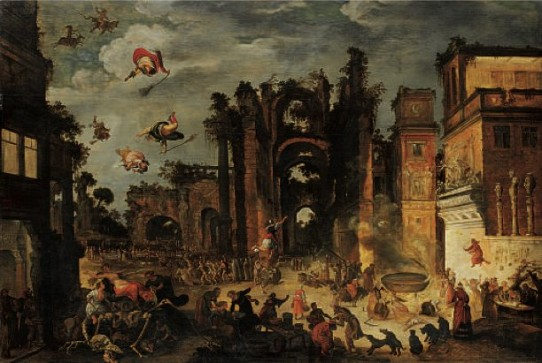 Heksensabbath. Unknown private collection ; Last location Art Dealer Peter Muhlbauer in Pocking (Germany), c. 2007.